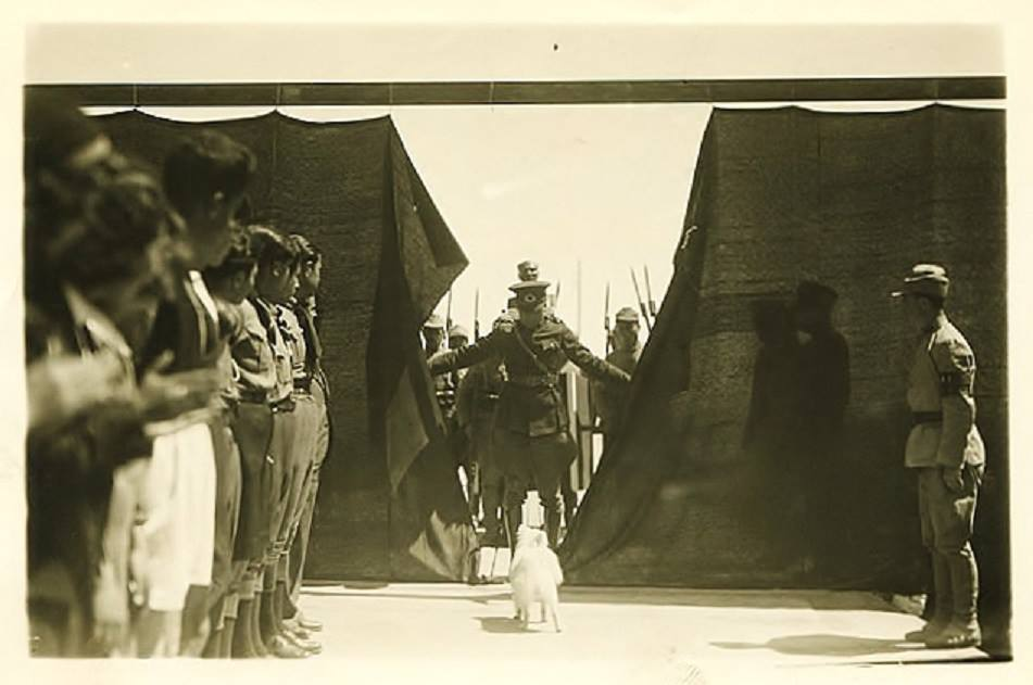 Mustafa Kemal'in Samsun'a çıkışını temsilen Tütün İskelesi'nde yapılan gösteri.